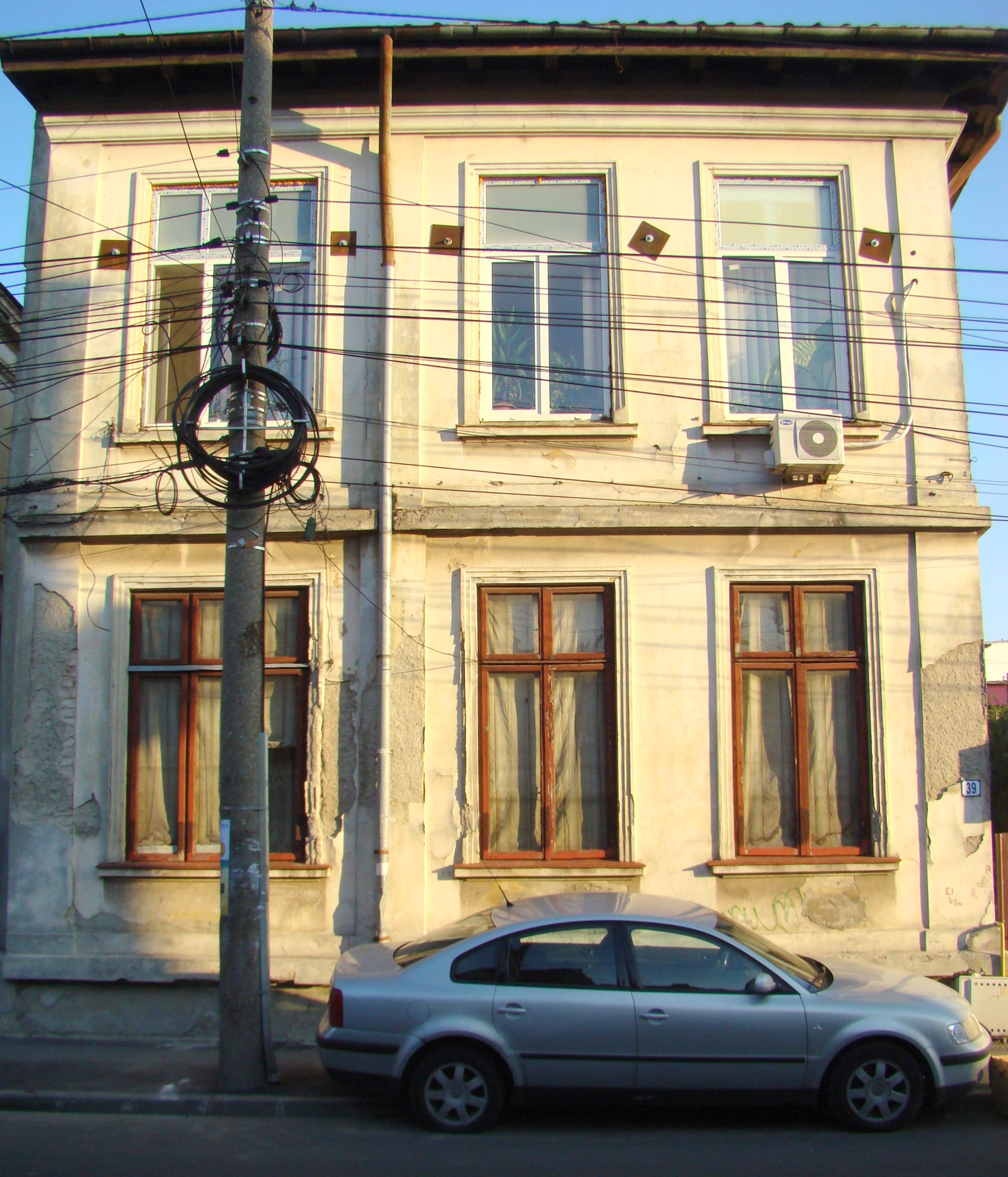 Clădire monument istoric, str. Mircea Vulcănescu, nr.39